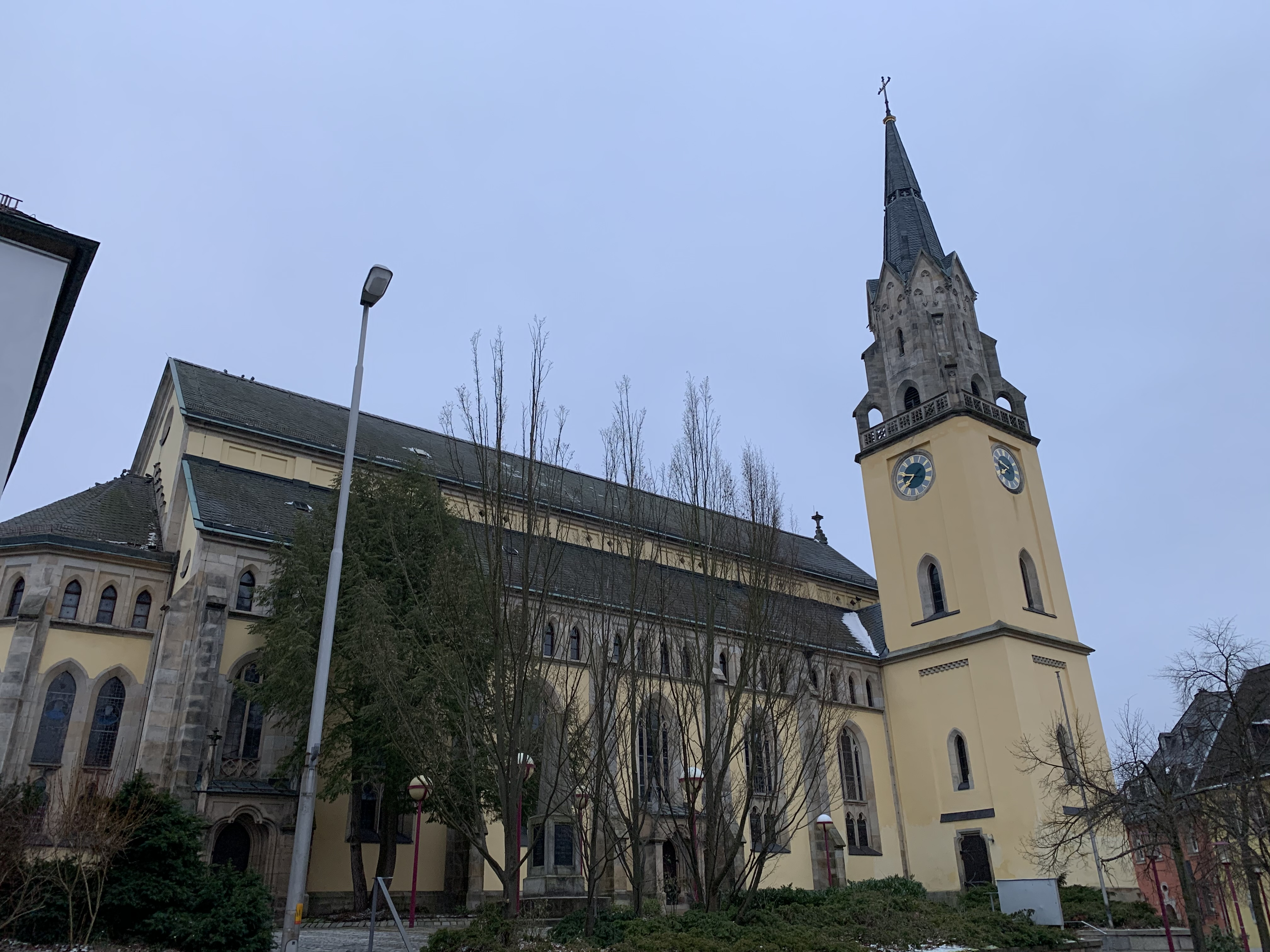 Die Stadtkirche St. Andreas entstand in den Jahren 1859 bis 1863 und befindet sich in Selb im Landkreis Wunsiedel in Bayern.